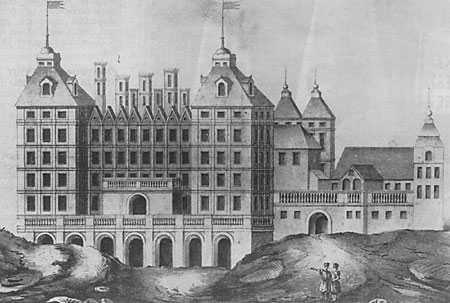 Kazanowski Palace in Warsaw